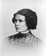 A. Pashkevich